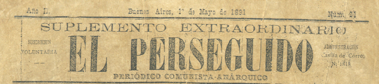 Portada de El Perseguido, periòdico anarquista de Buenos Aires